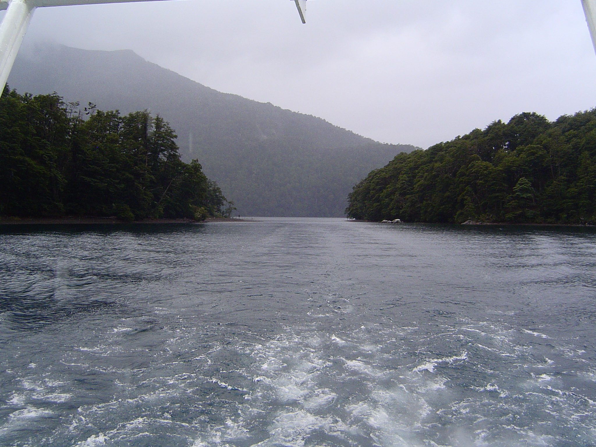 La unión de ambos lagos. Marzo de 2006.